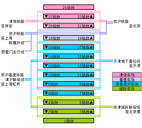 根据京沪高速铁路天津西站站场示意图绘制